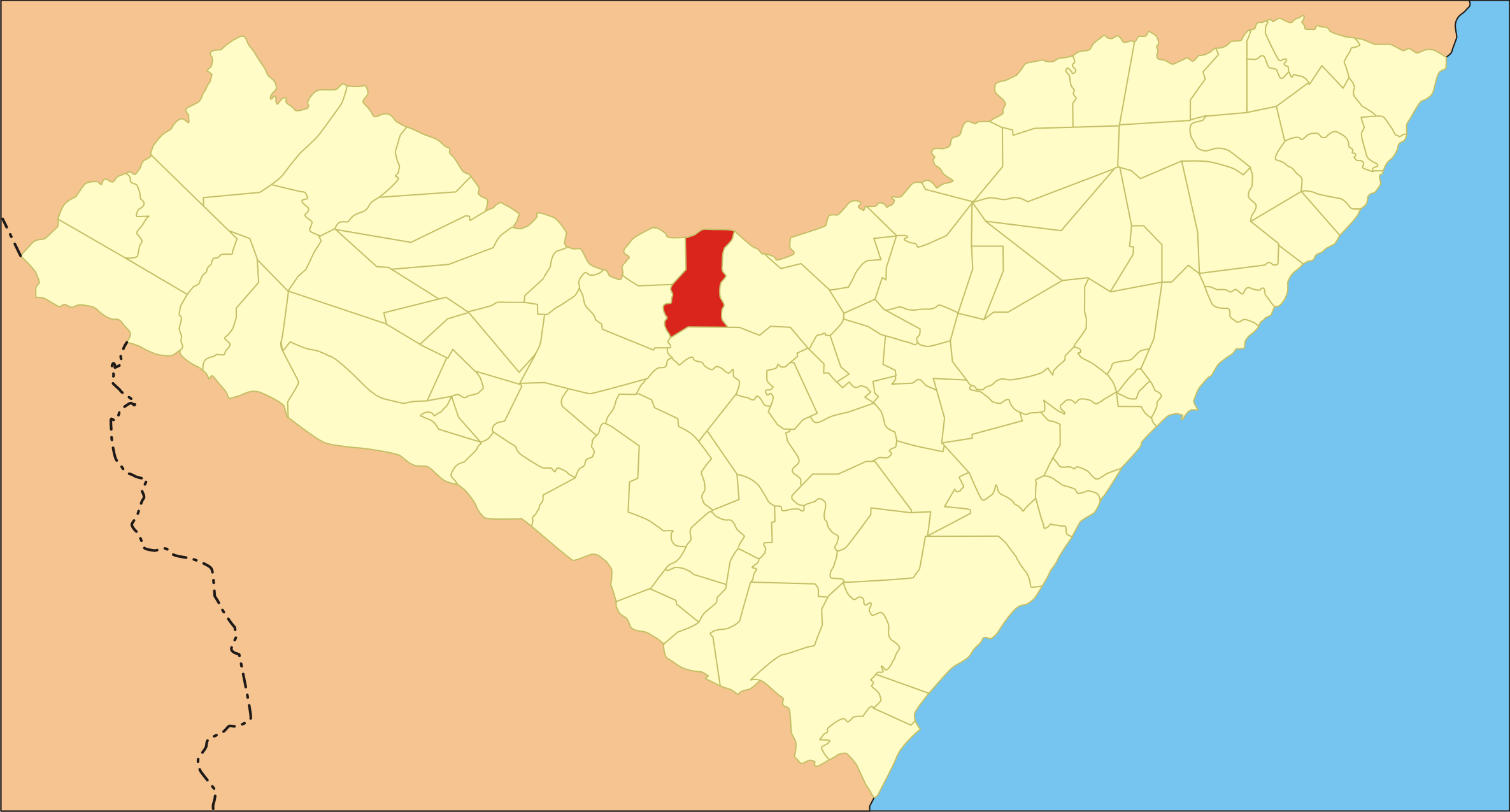 Localização da cidade em Alagoas